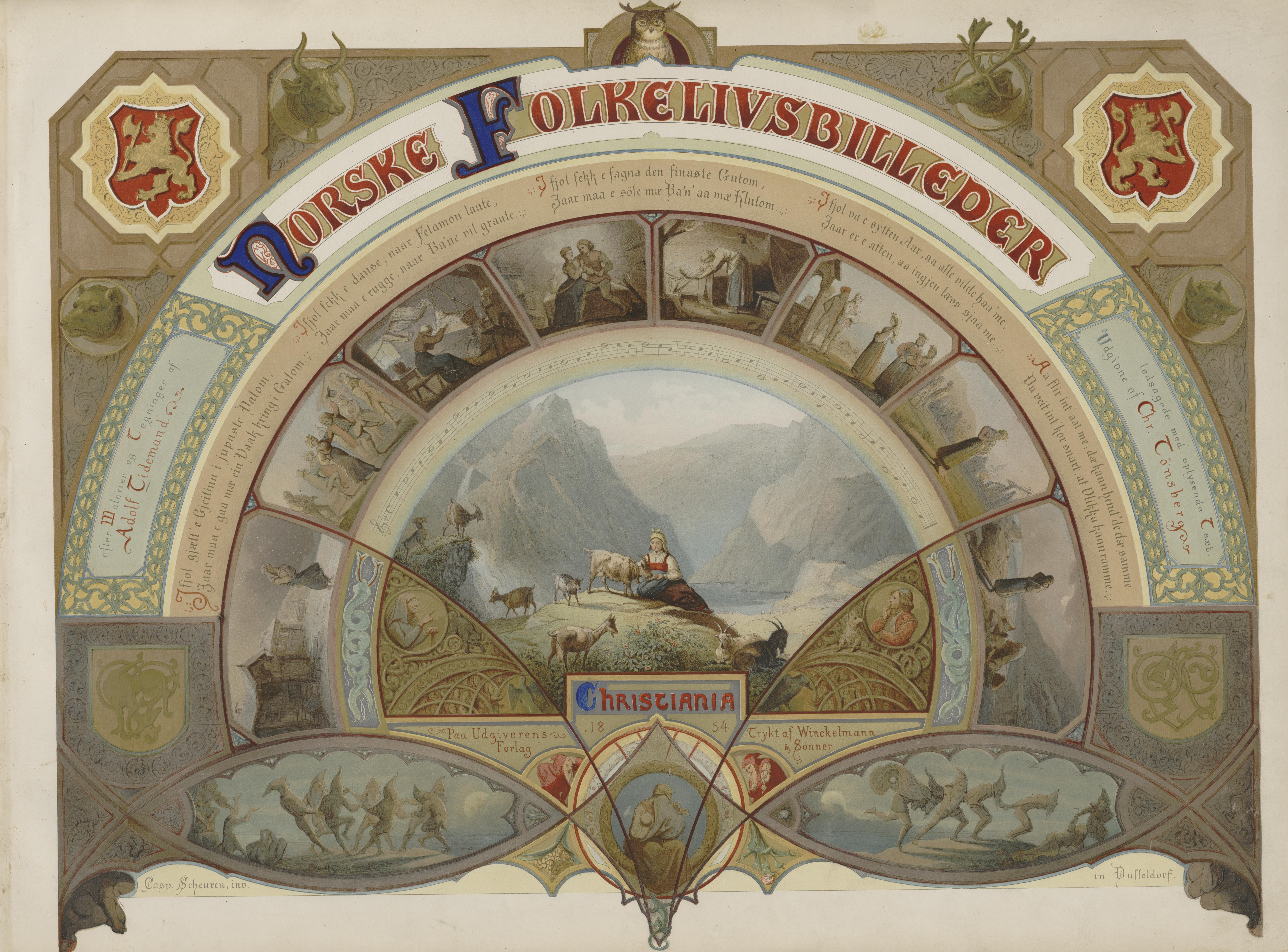 Illustrasjon hentet fra boken Norske Folkelivsbilleder av Tidemand, Adolph og utgitt av Chr. Tønsberg (Christiania, 1854)